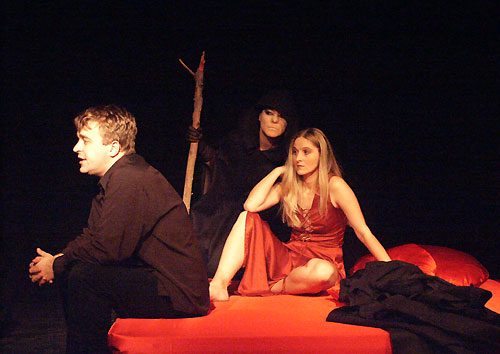 Jelenet Shakespeare: Macbeth című tragédiájából. Macbeth: Orosz Róbert, Lady Macbeth: Kovács Éva Rebecca. Rendező: Balkay Géza 2002-ben